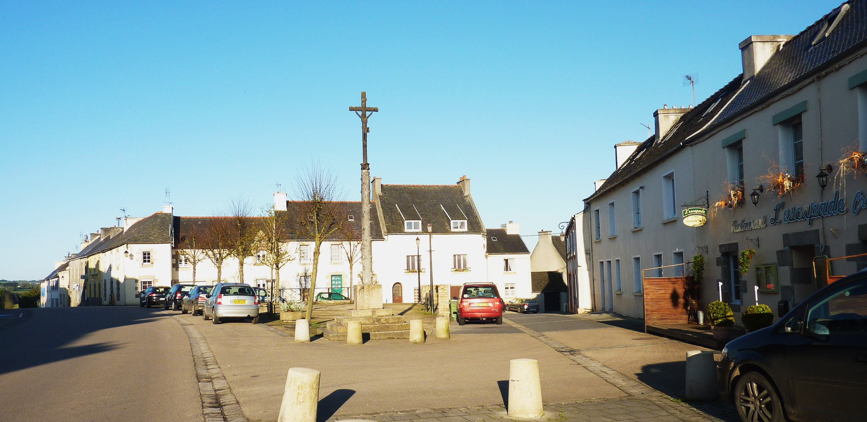 Lampaul-Guimiliau : la place centrale et le calvaire dit "Croix-du-Villiers" (1884) avec ses écots le long du fut